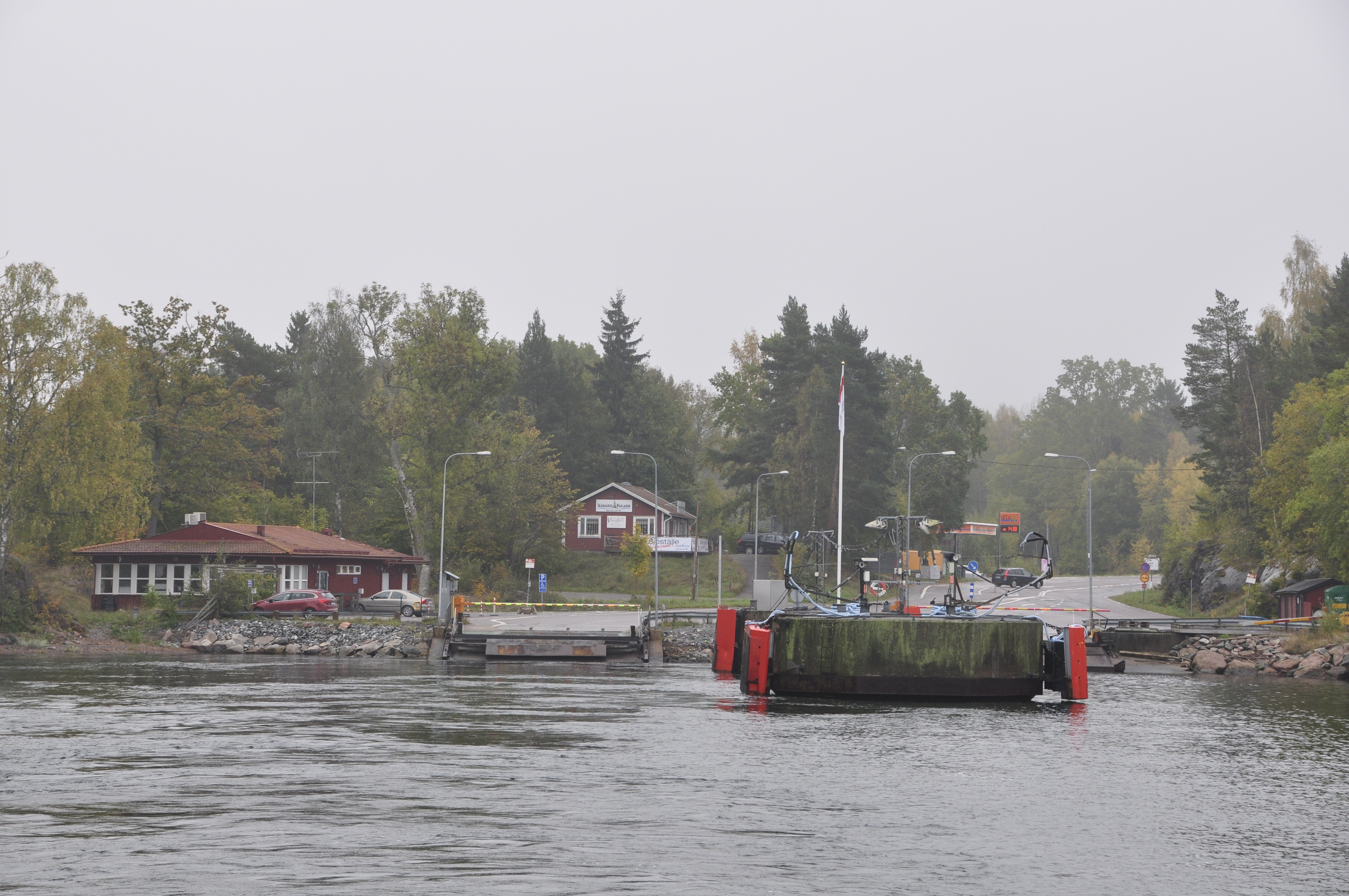 Ljusterö färjläge 2014